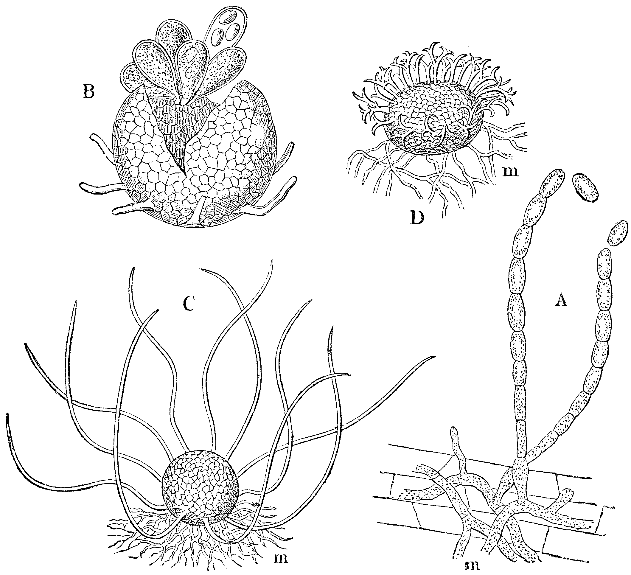 Slika 334. Rastlinska medéna slana. (Erysíphe commúnis.) [sic!]